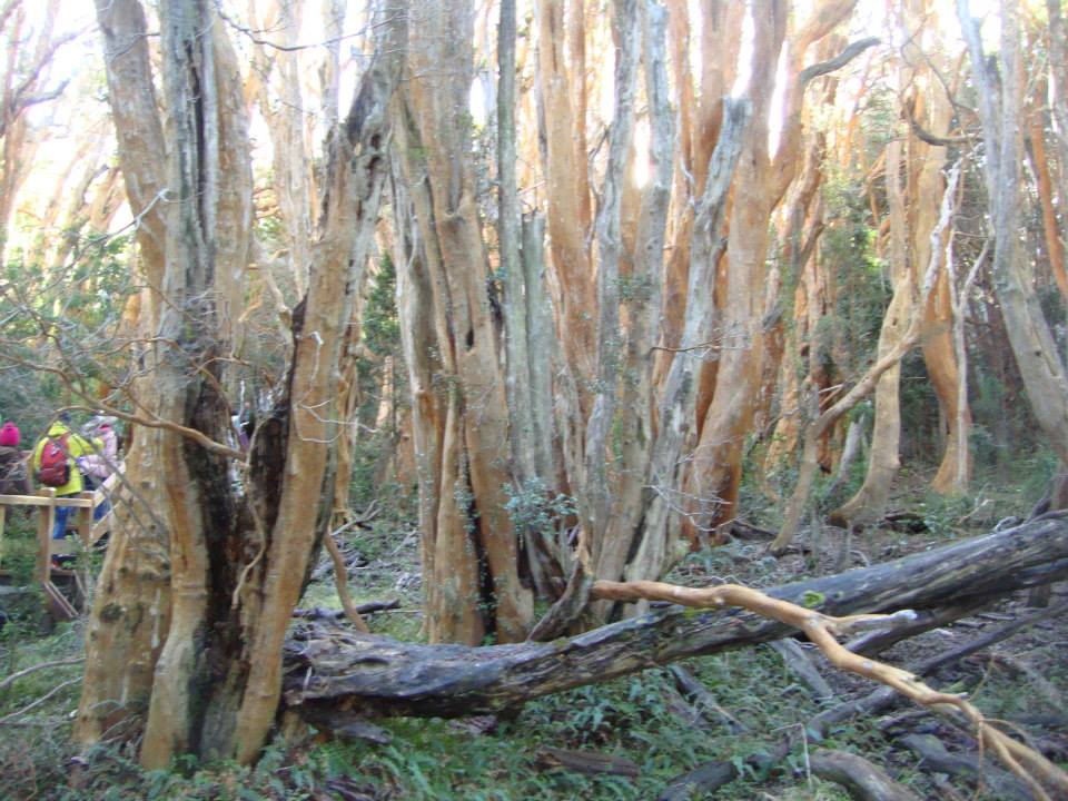 Recorrido por el sendero dentro del Parque Nacional Arrayanes en Villa la Angostura